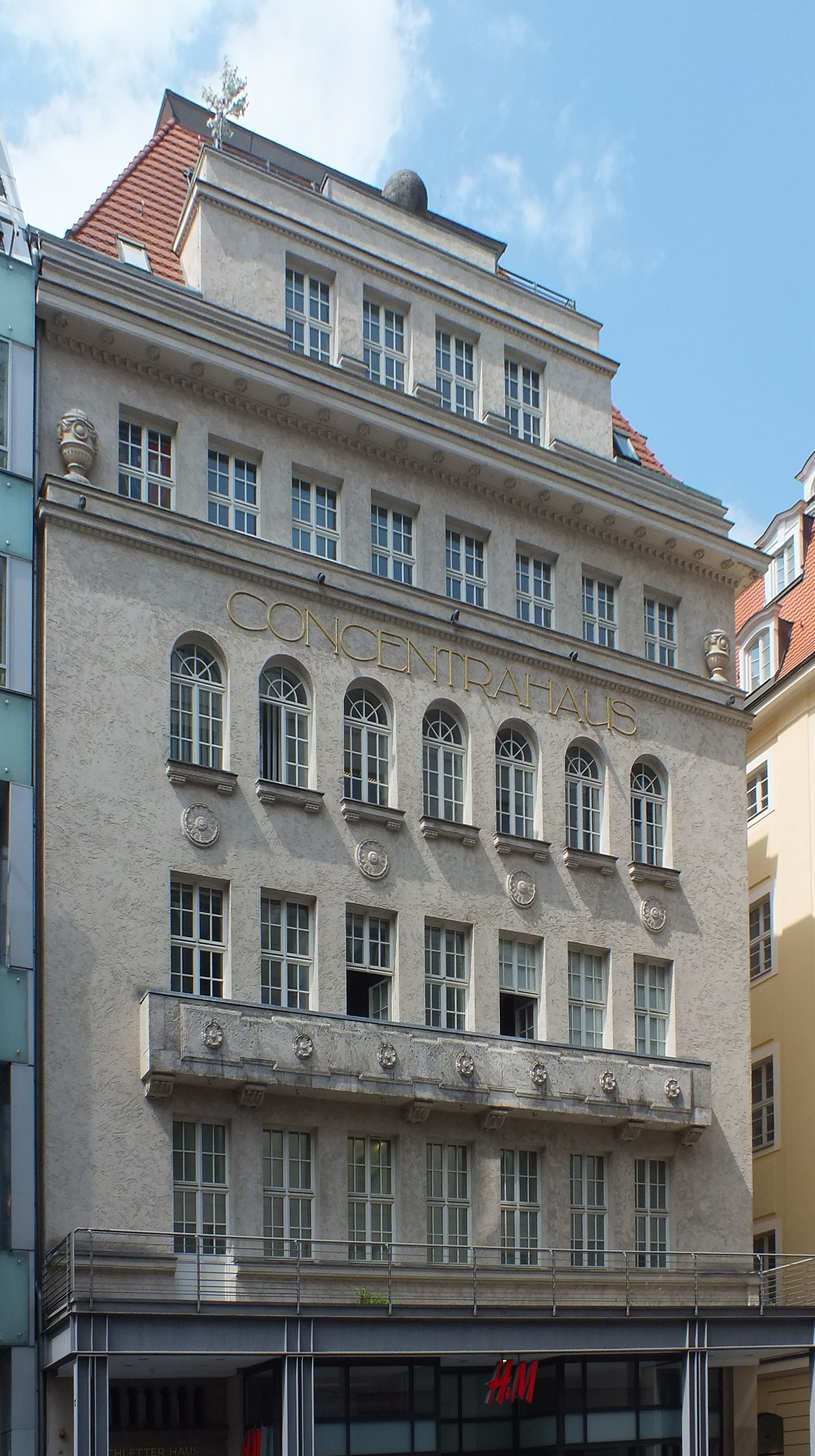 Das Concentrahaus in der Leipziger Petersstraße